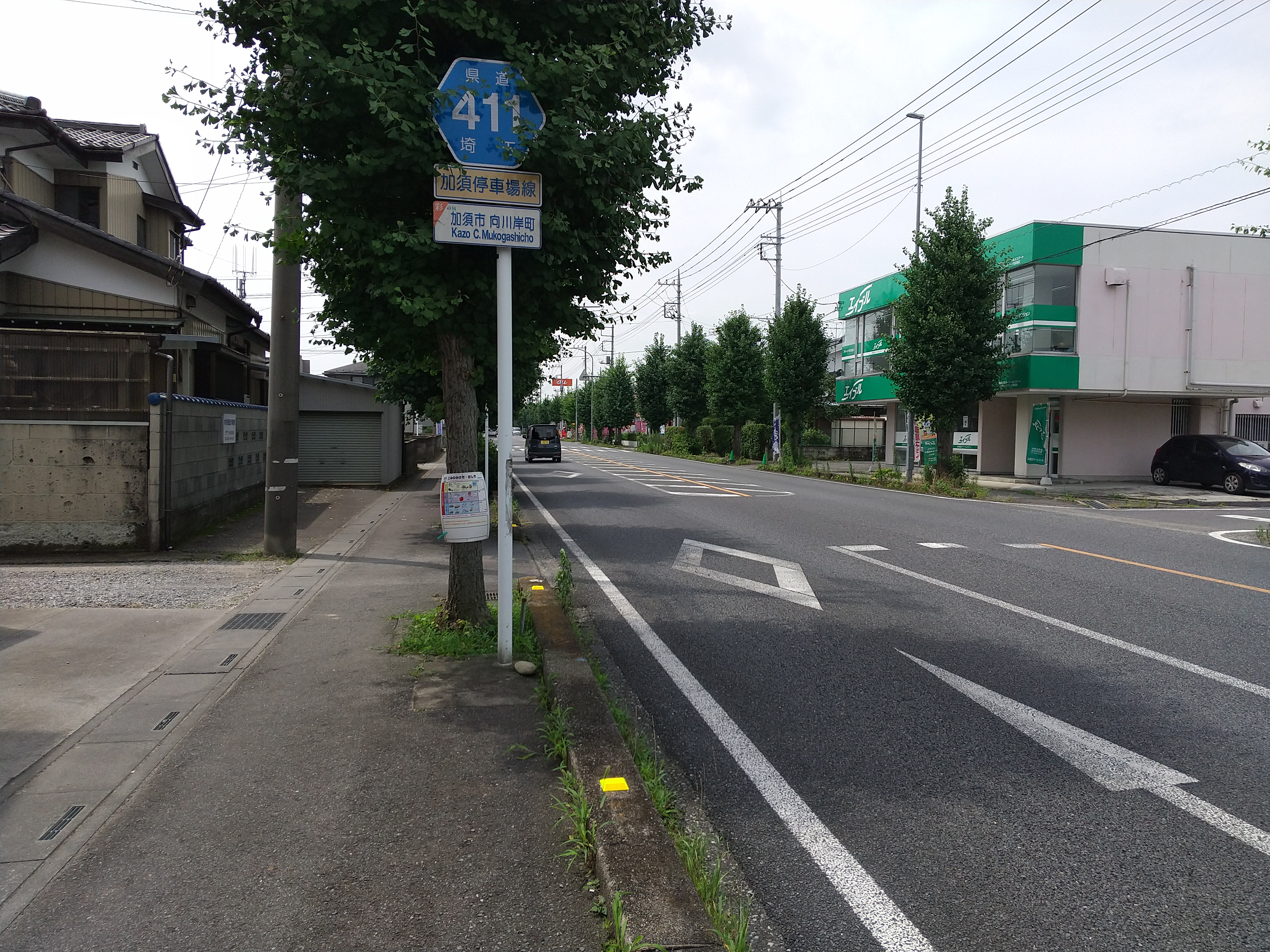 加須市向川岸町付近にて